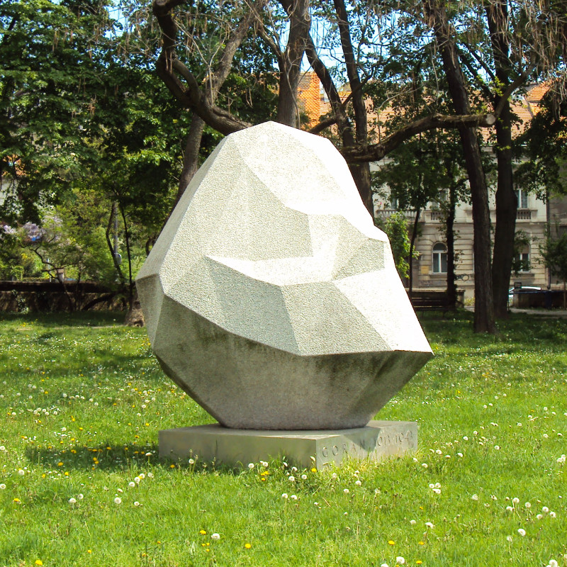 Spomenik Ivanu Goranu Kovacicu